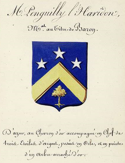 Armoiries du Baron Penguilly L'Haridon, d'après les lettres patentes du 10 avril 1830. Registre des armoiries peintes, Archives nationales.